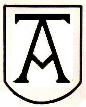 Wappen der Stadt Aschaffenburg von 1633 bis 1839